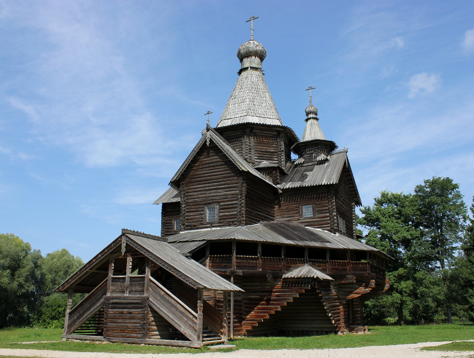 Деревянная церковь (Рождества Пресвятой Богородицы) из д. Передки Боровичского района (Новгородская область, Великий Новгород, Витославлицы, строение 14)